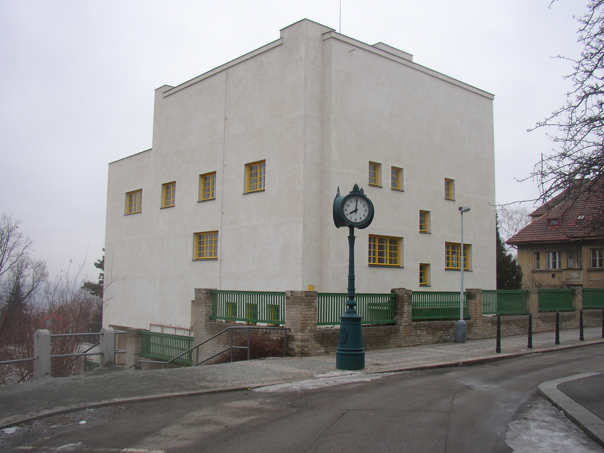 Müllerova vila od Adolfa Loose v Praze-Střešovicích. Pohled od Z.